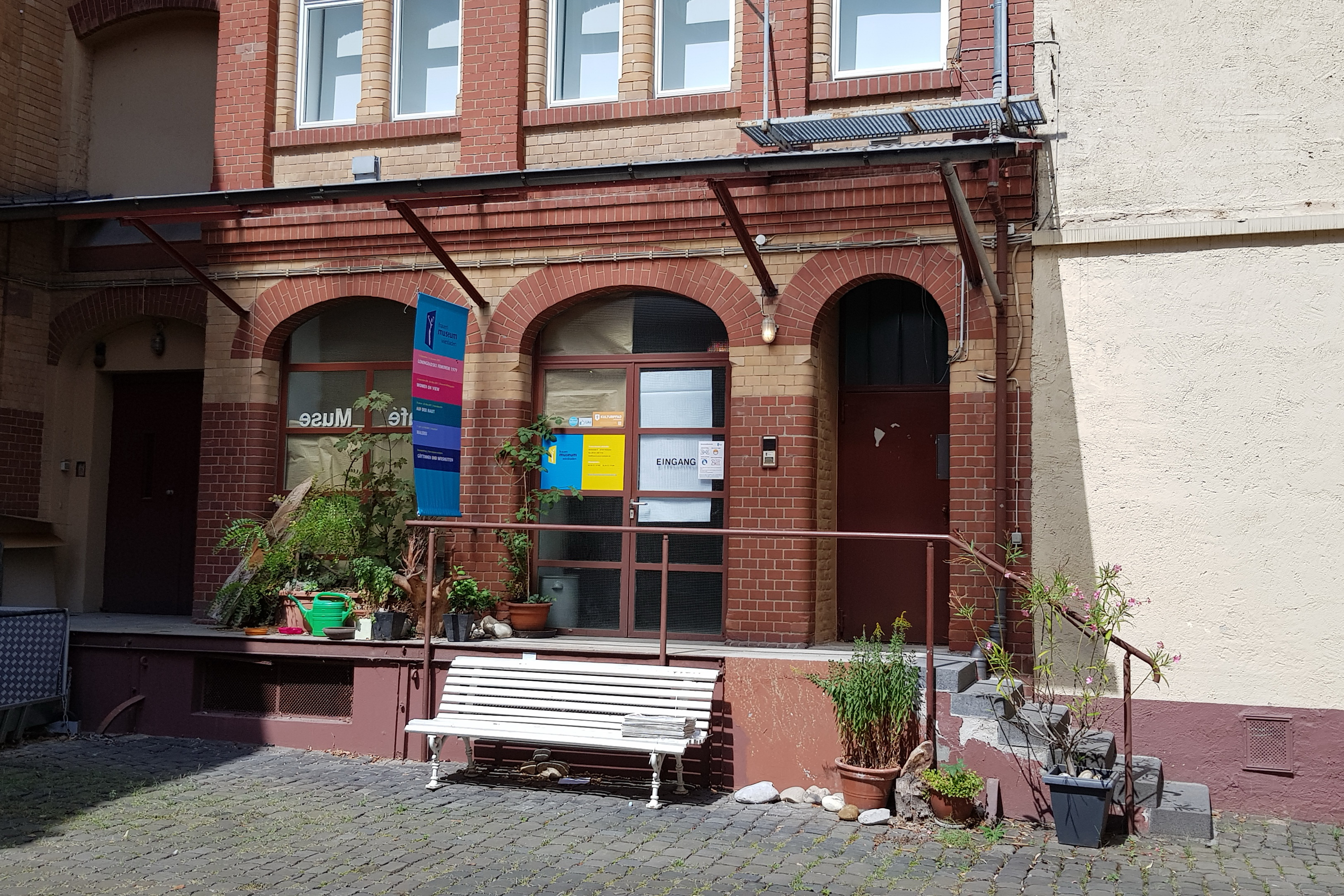 Eingang zum „frauen museum wiesbaden“ in Wiesbaden-Mitte, Wörthstraße 5.